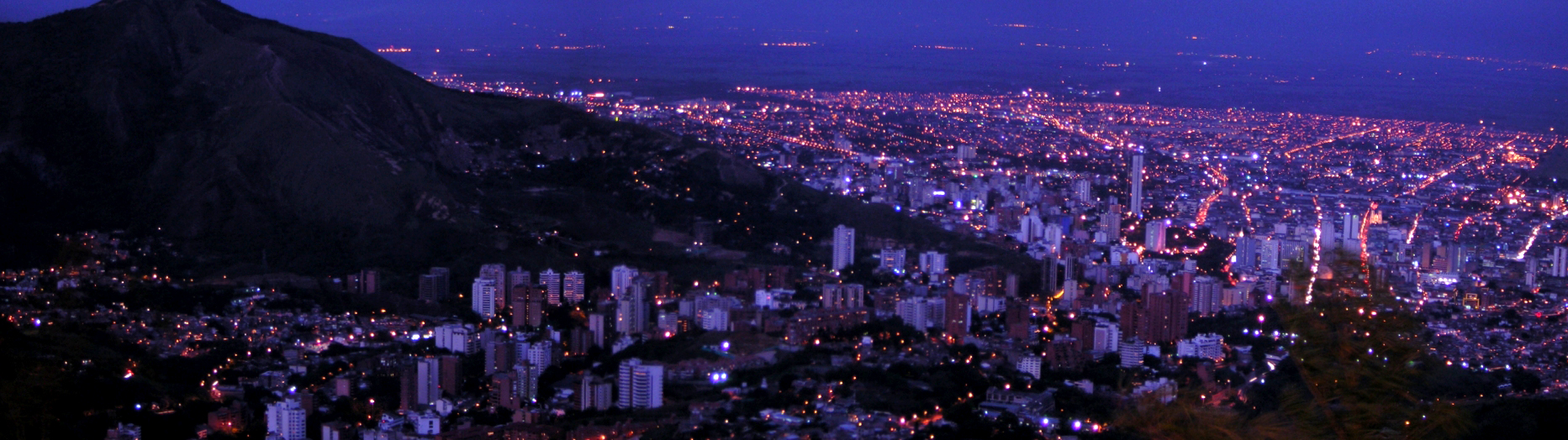 CAli de Noche desde Cristo Rey